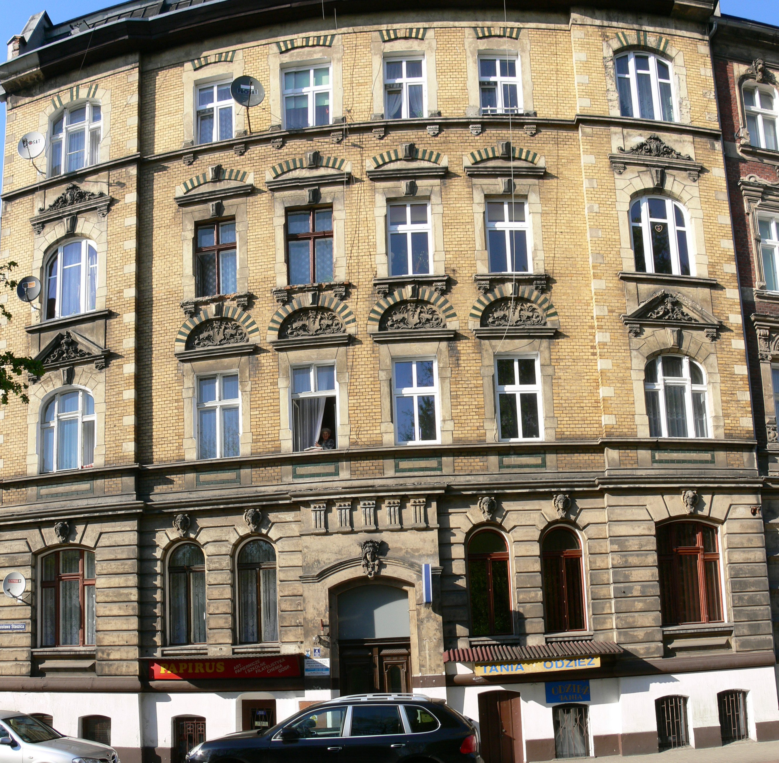 ul. Staszica nr 4